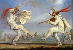 Illustratie uit de 19e eeuw van de Commedia dell'Arte. De maker is onbekend. Wel is de illustratie gebruikt in het boek: Pulcinella, maschera del mondo.. Ook daar wordt de maker niet vermeld.